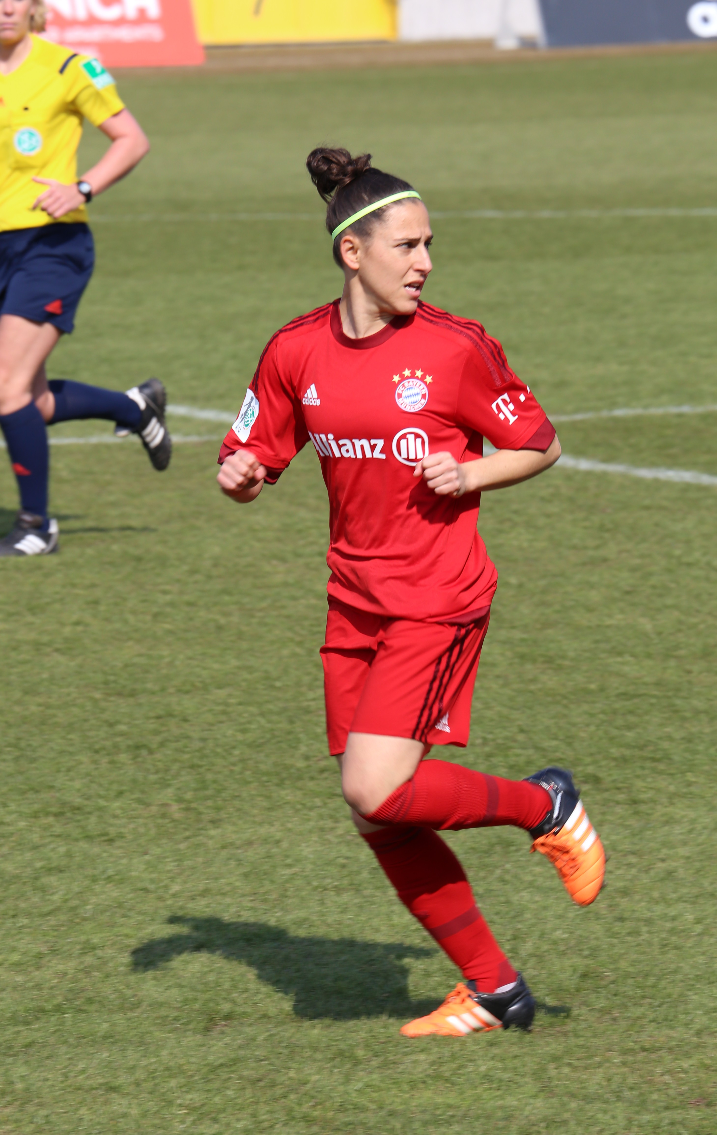 Verónica Boquete (FC Bayern München) beim Frauen-Bundesliga-Spiel FC Bayern München gegen FF USV Jena am 19. März 2016 im Stadion an der Grünwalder Straße (Ergebnis war 5:1).